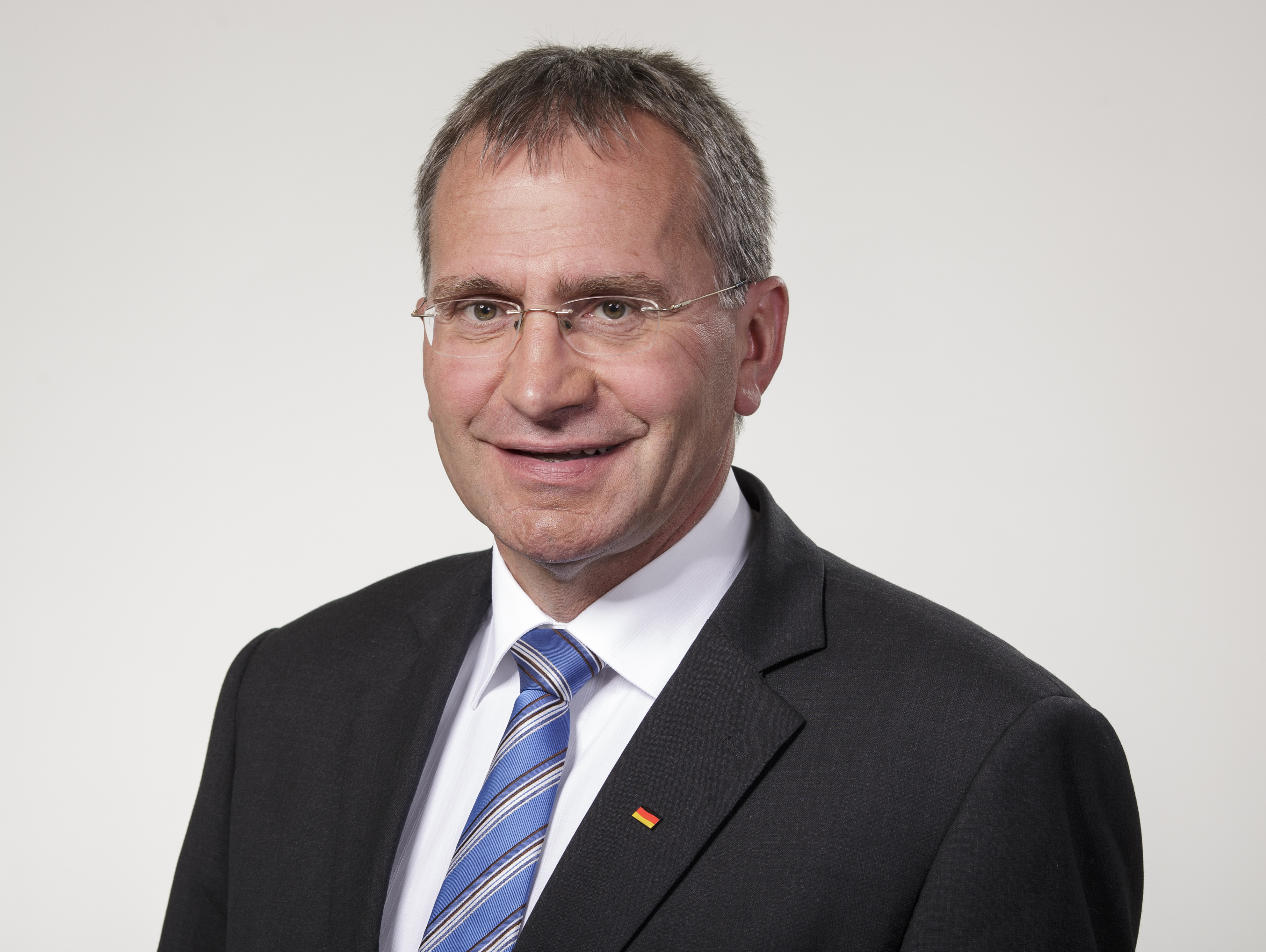 Paul Lehrieder, MdB (2012)